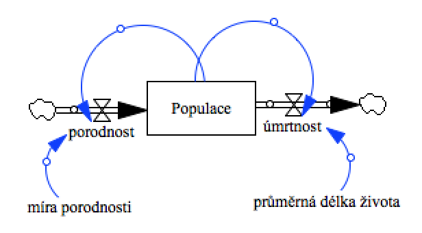 SFD zivotniho cyklu vytvoreno ve Vensimu